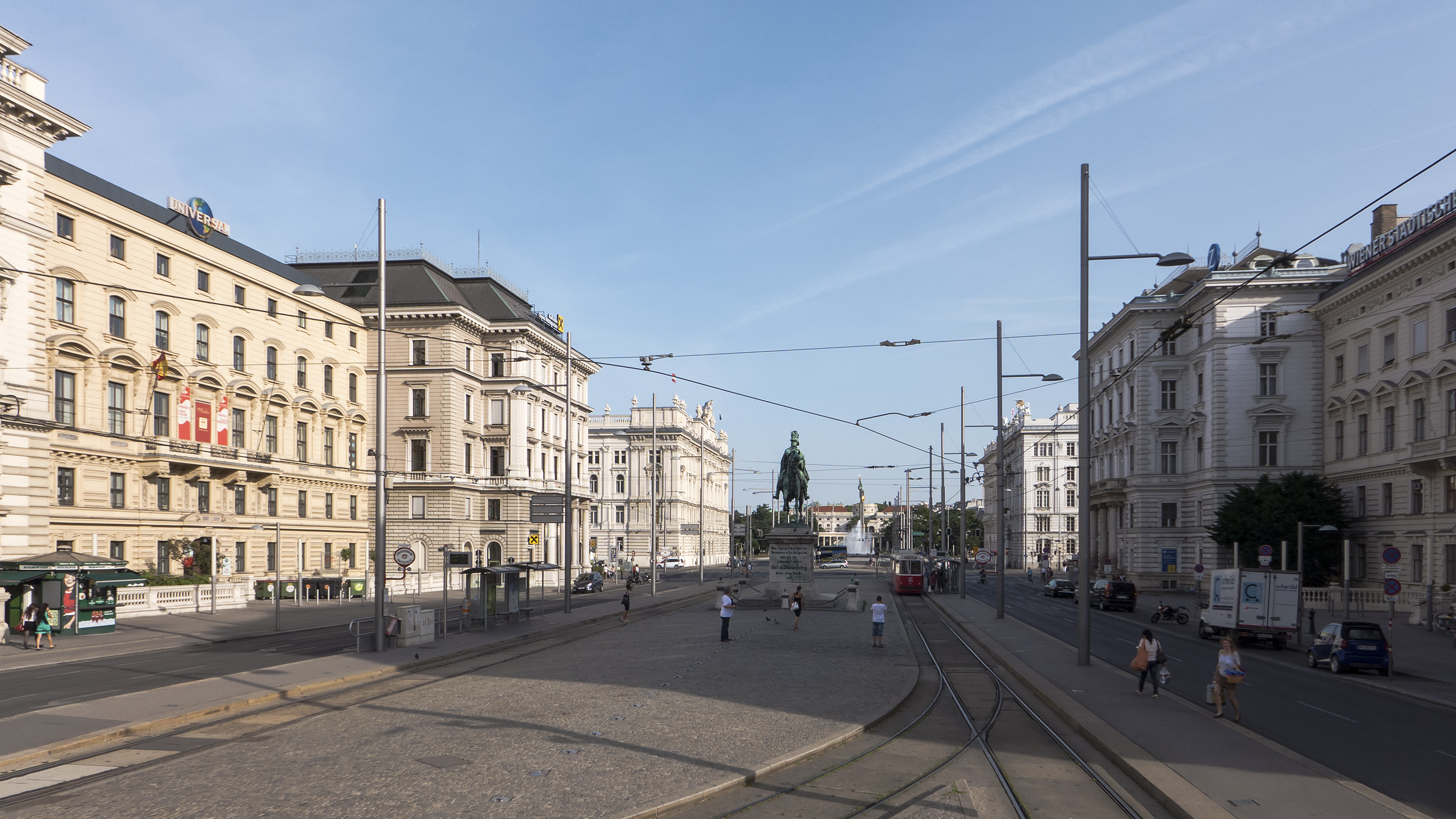 Schwarzenbergplatz in Wien 1 Richtung Süden